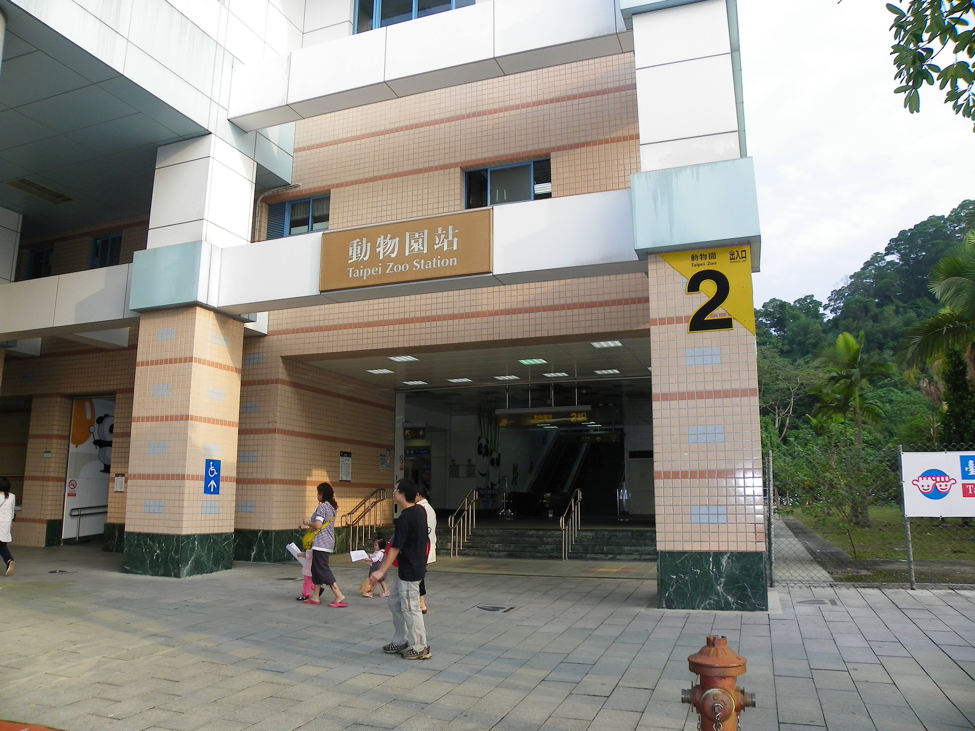 台北捷運文山線動物園駅の2号出口。